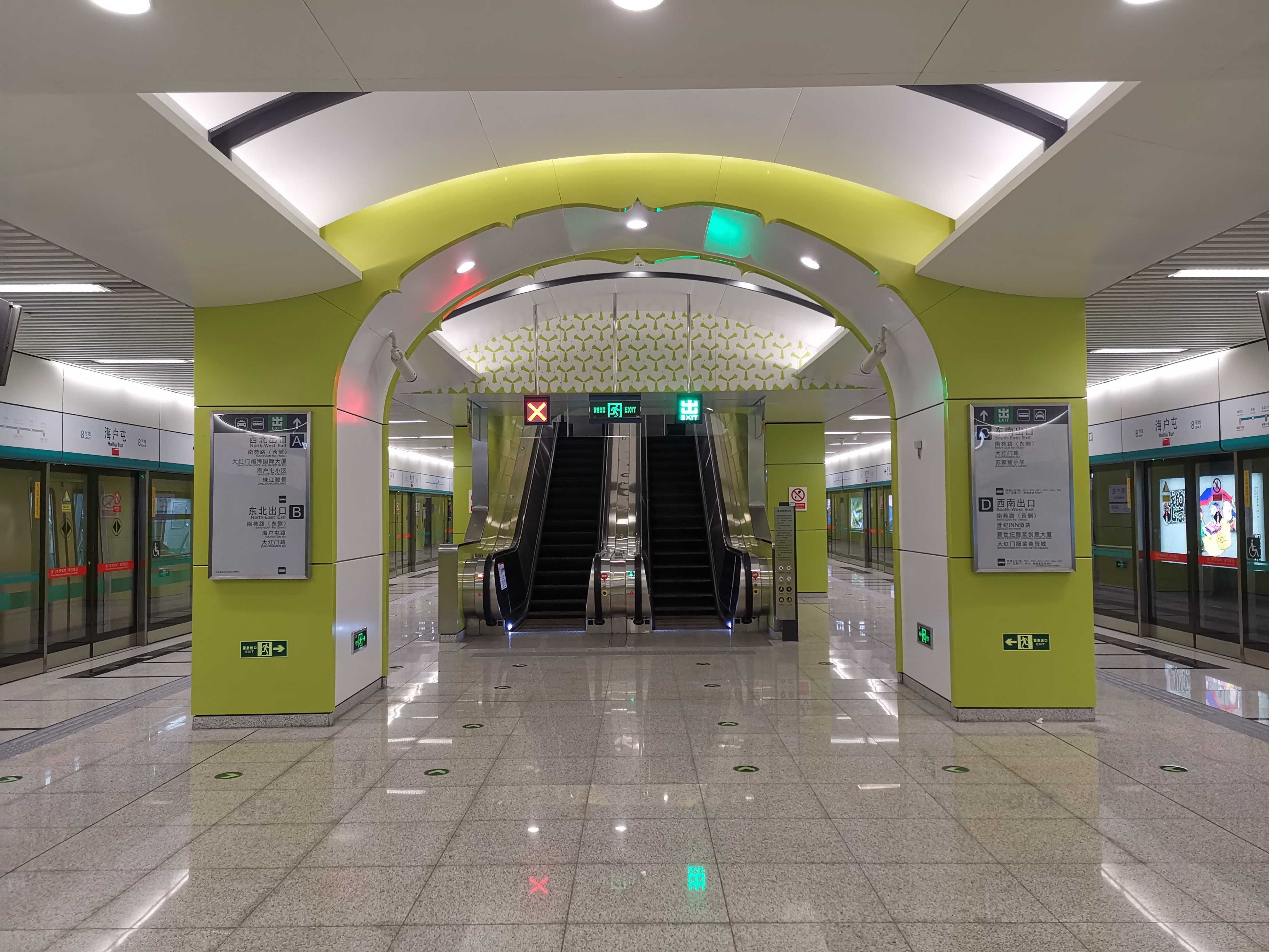 海户屯站，2019年1月。可能是由于南苑机场和大红门站不开放的原因，8号线人烟稀少。